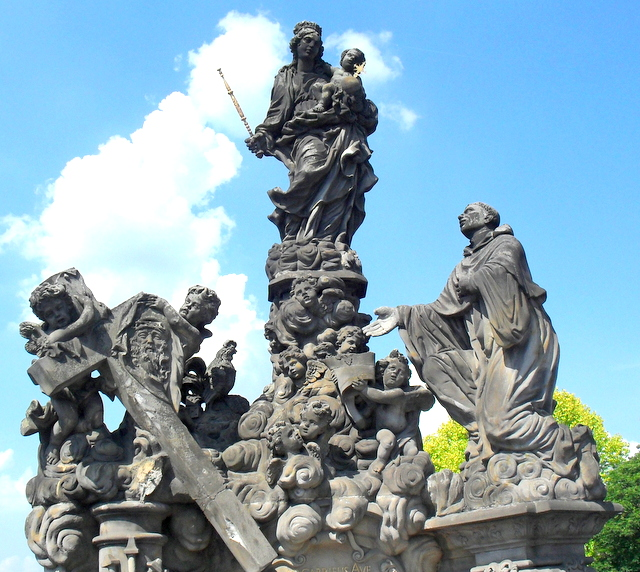 Matka Boża z Dzieciątkiem i św. Bernard na moście Karola w Pradze(Aw58)